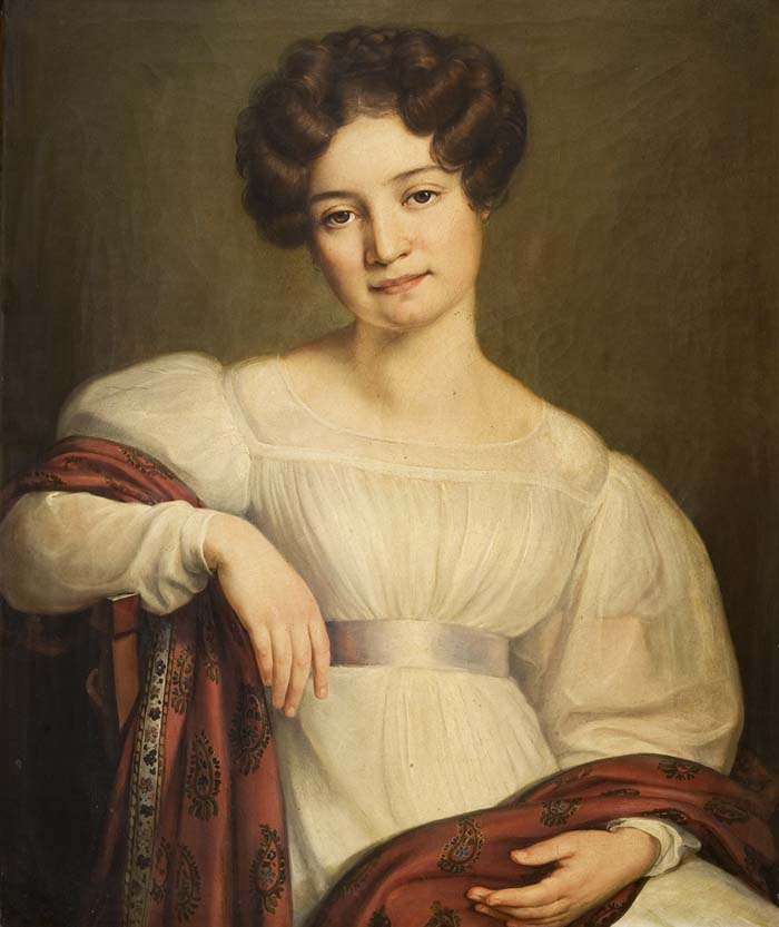 Portrait Auguste von Kessler (geb. von Vellnagel)